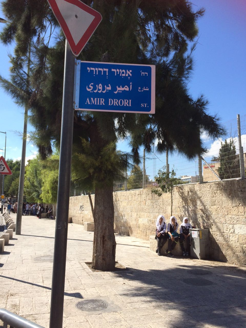 שלט רחוב אמיר דרורי בכניסה למוזיאון רוקפלר